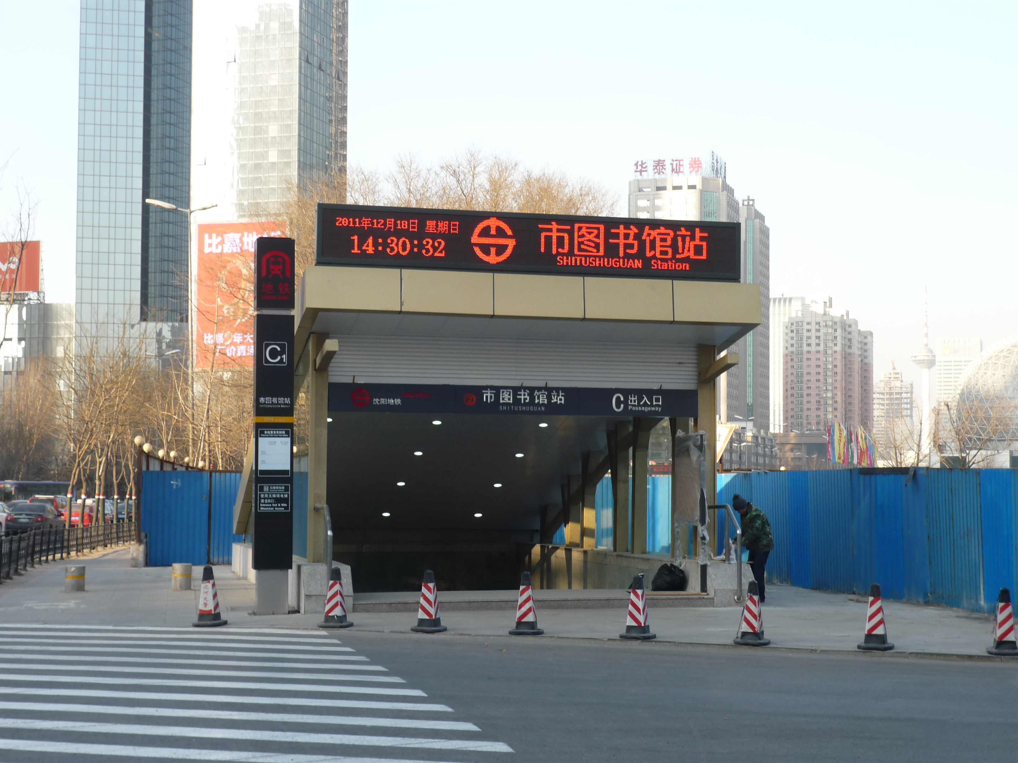 瀋陽地下鉄2号線の市図書館駅（東南口）